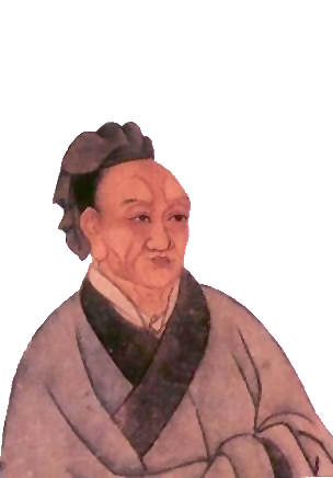 司馬遷画像